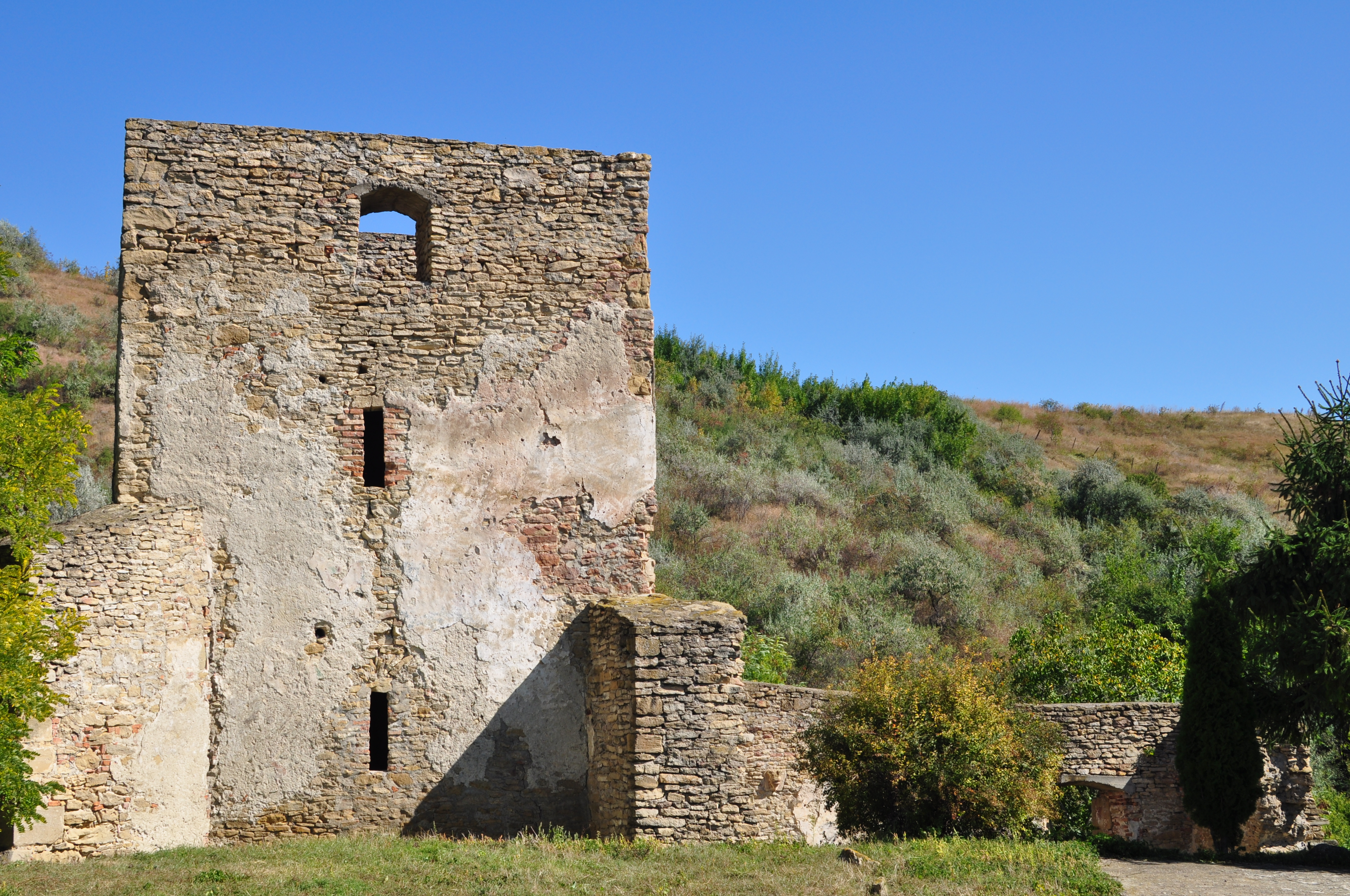 Ruinele bisericii catolice din Cotnari, județul Iași